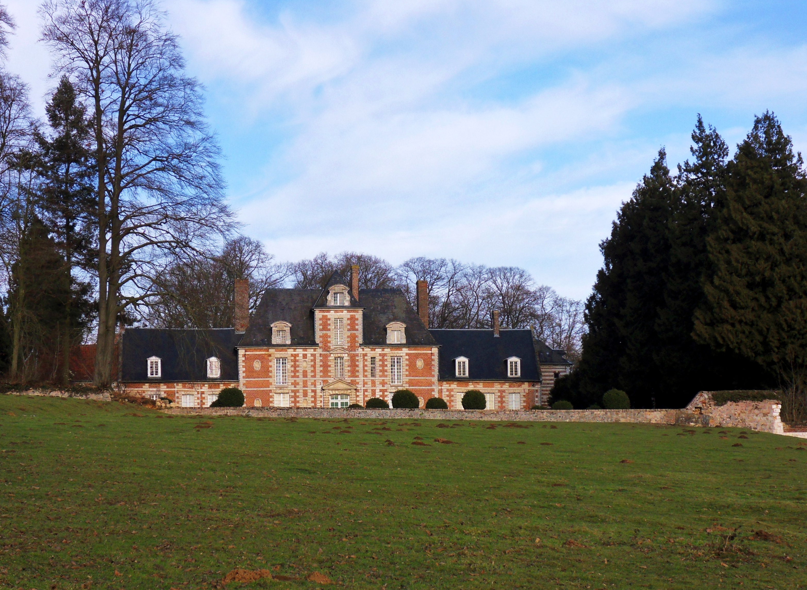 Vauchelles-lès-Domart (Somme, France). Le château, vu depuis la route venant de Mouflers.